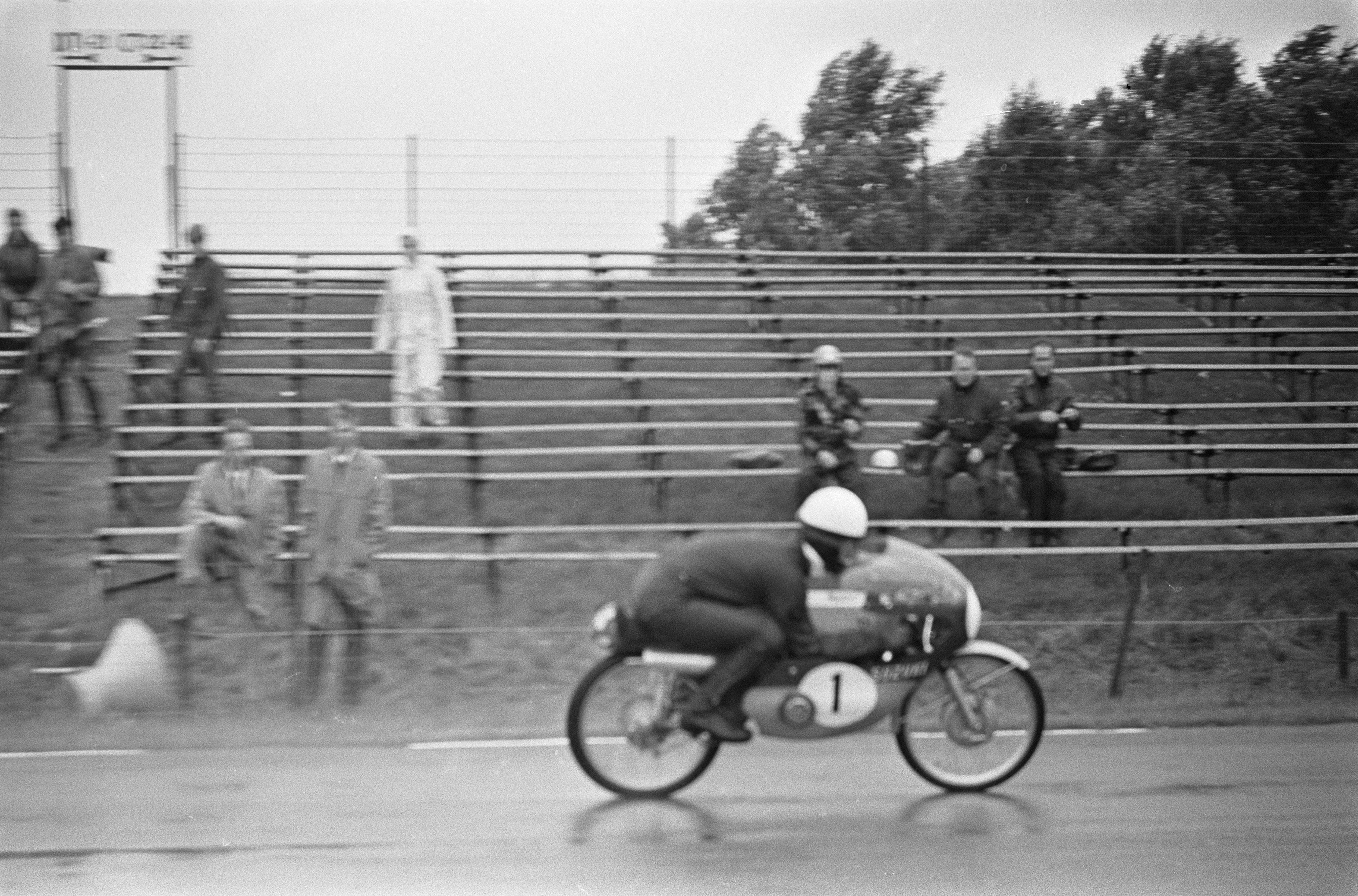 Collectie / Archief : Fotocollectie Anefo Reportage / Serie : TT Assen 1968 Beschrijving : TT te Assen. Training. Hans-Georg Anscheidt op zijn Suzuki in de 50cc klasse. Datum : 27 juni 1968 Locatie : Assen Trefwoorden : motorsport Persoonsnaam : Anscheidt, Hans-Georg Instellingsnaam : TT Fotograaf : Nijs, Jac. de / Anefo Auteursrechthebbende : Nationaal Archief Materiaalsoort : Negatief (zwart/wit) Nummer archiefinventaris : bekijk toegang 2.24.01.05 Bestanddeelnummer : 921-4715